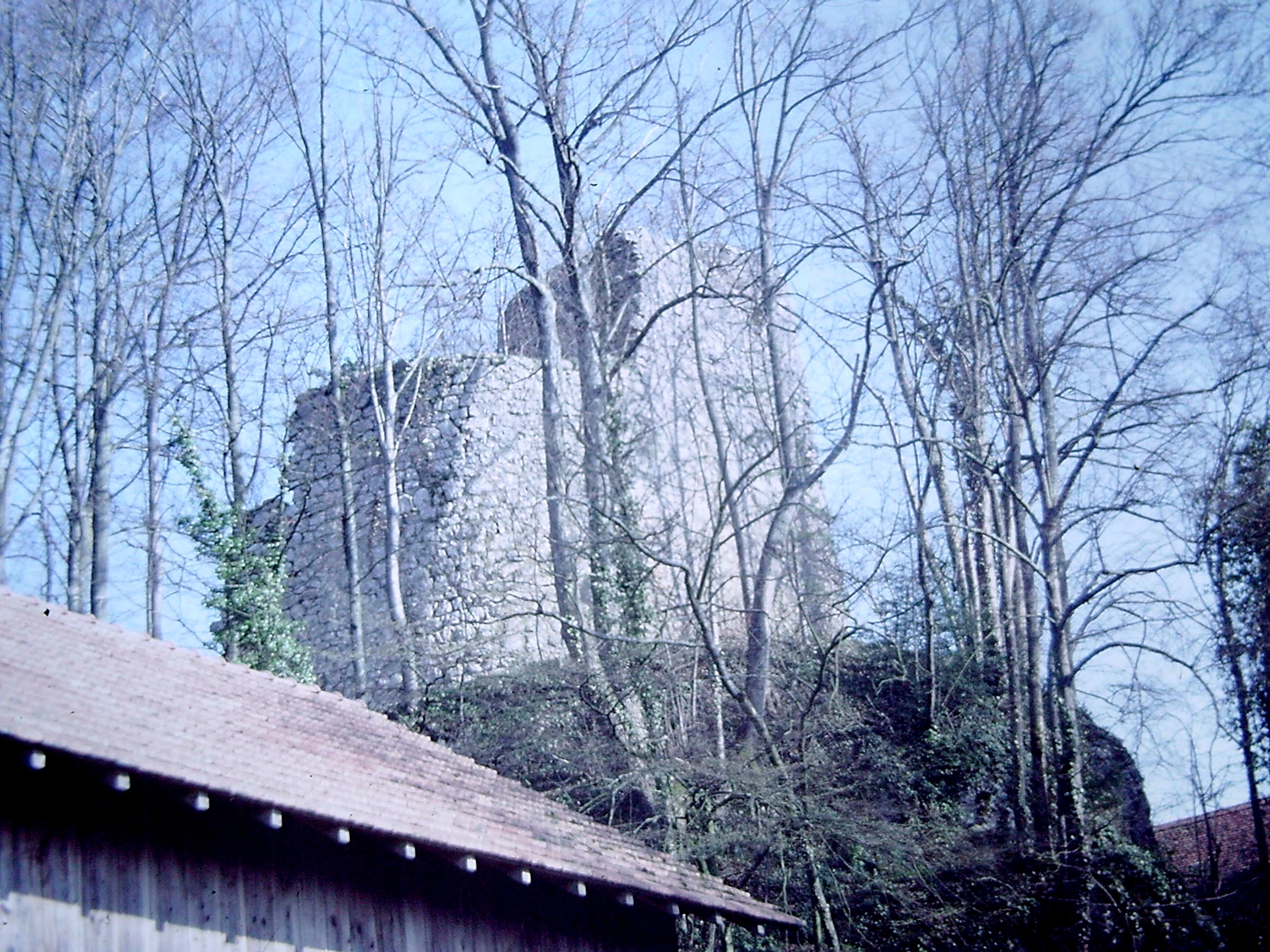 Liebebstein - vue générale